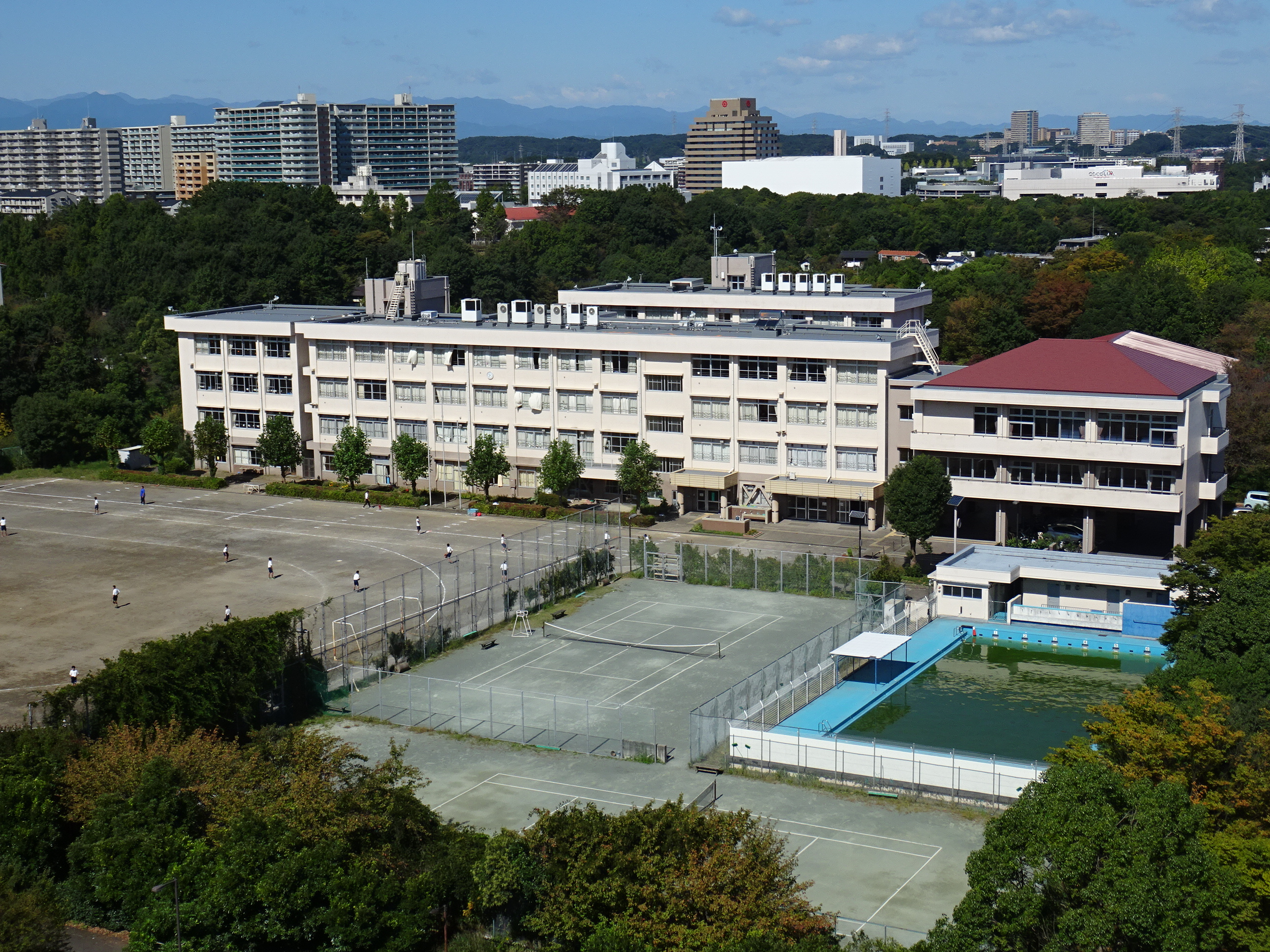 多摩ニュータウン落合地区の多摩市立落合中学校（2015/10/08撮影）